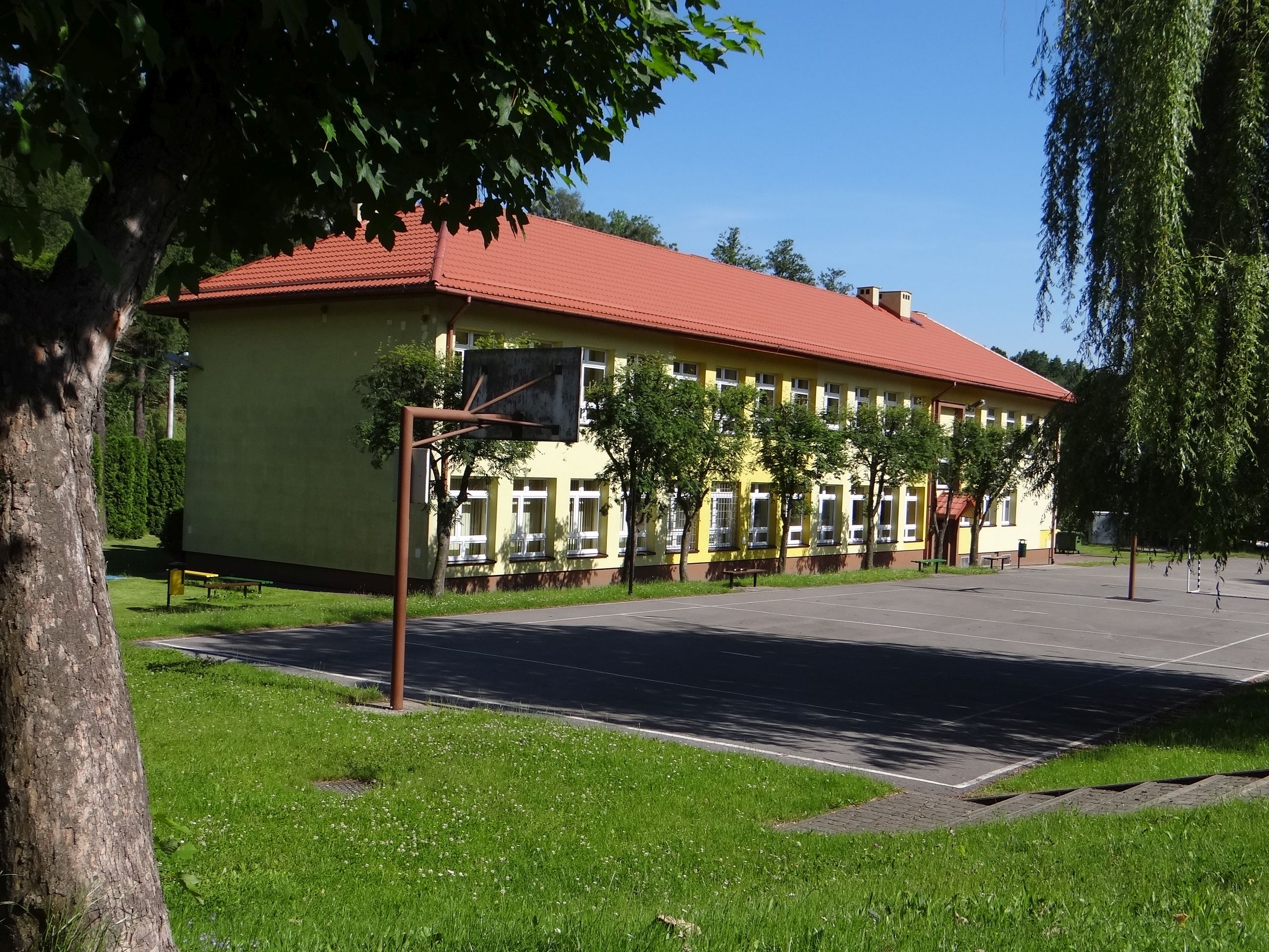 Szkoła w Filipowicach